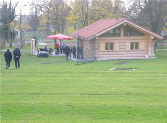 Clubhaus auf der Swingolfanlage in Lavigny am Genfer See